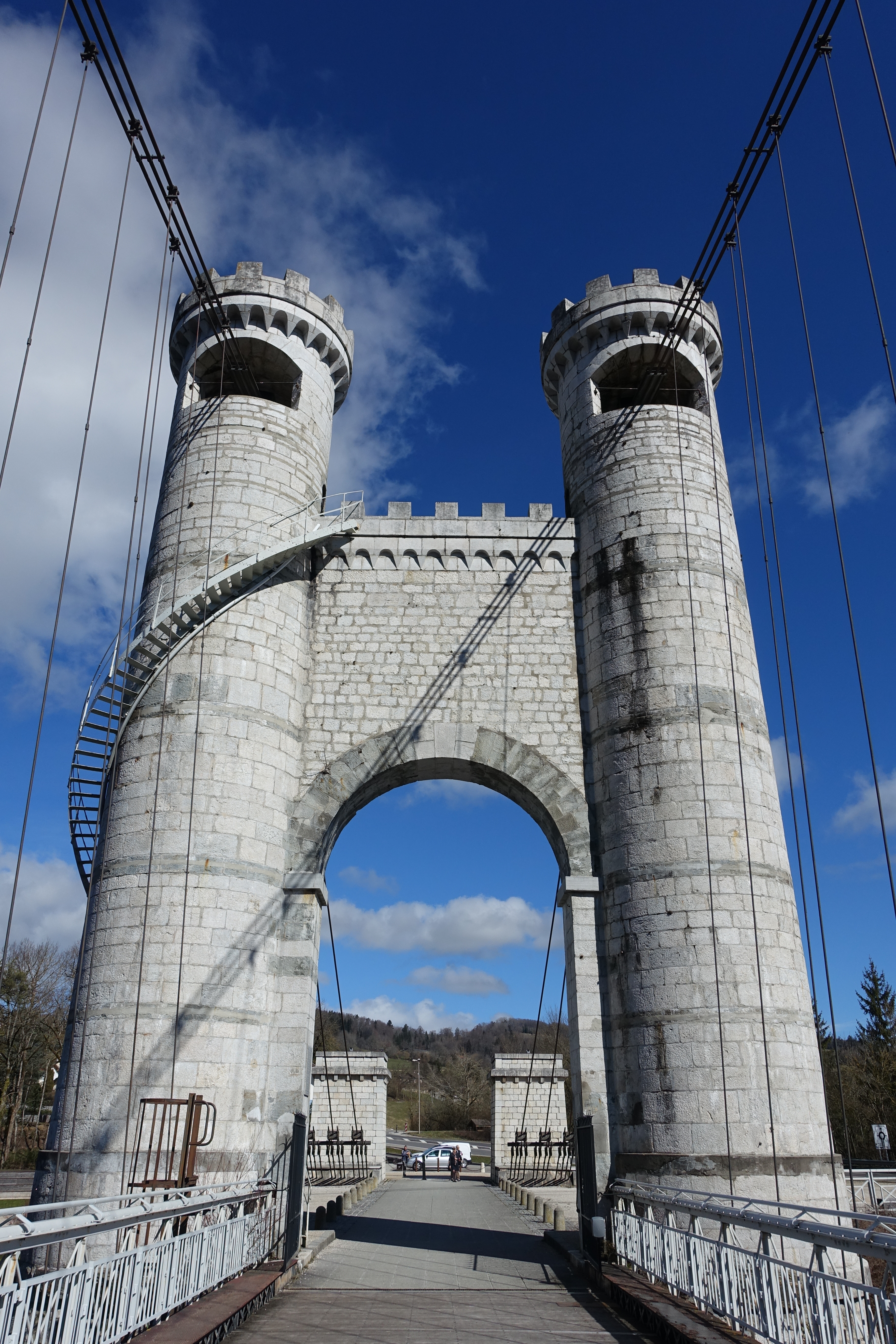 North gate @ Pont Charles Albert @ Ponts de la Caille